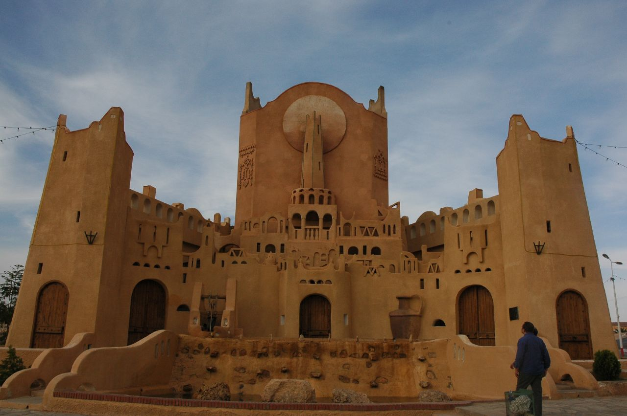 Architecture traditionnelle, Ghardaïa, région du Mzab, Algérie